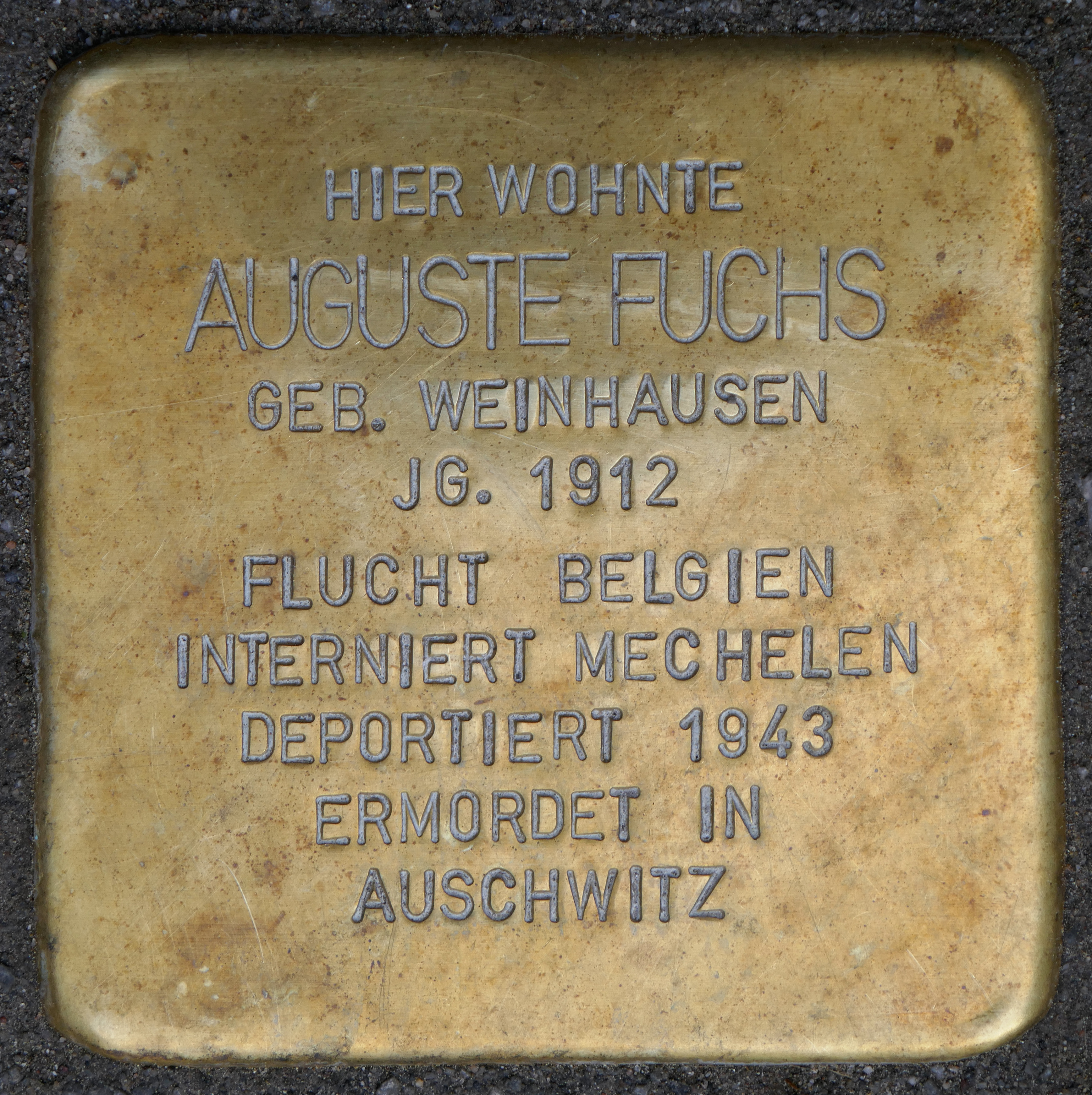 Stolperstein: Auguste Fuchs (Lotharstraße 14), Köln. Verlegestelle vor dem Gebäude der Rheinischen Musikschule (Regionalschule Köln-Sülz) und dem Schiller-Gymnasium Köln (Teilstandort Lotharstraße 14-18).